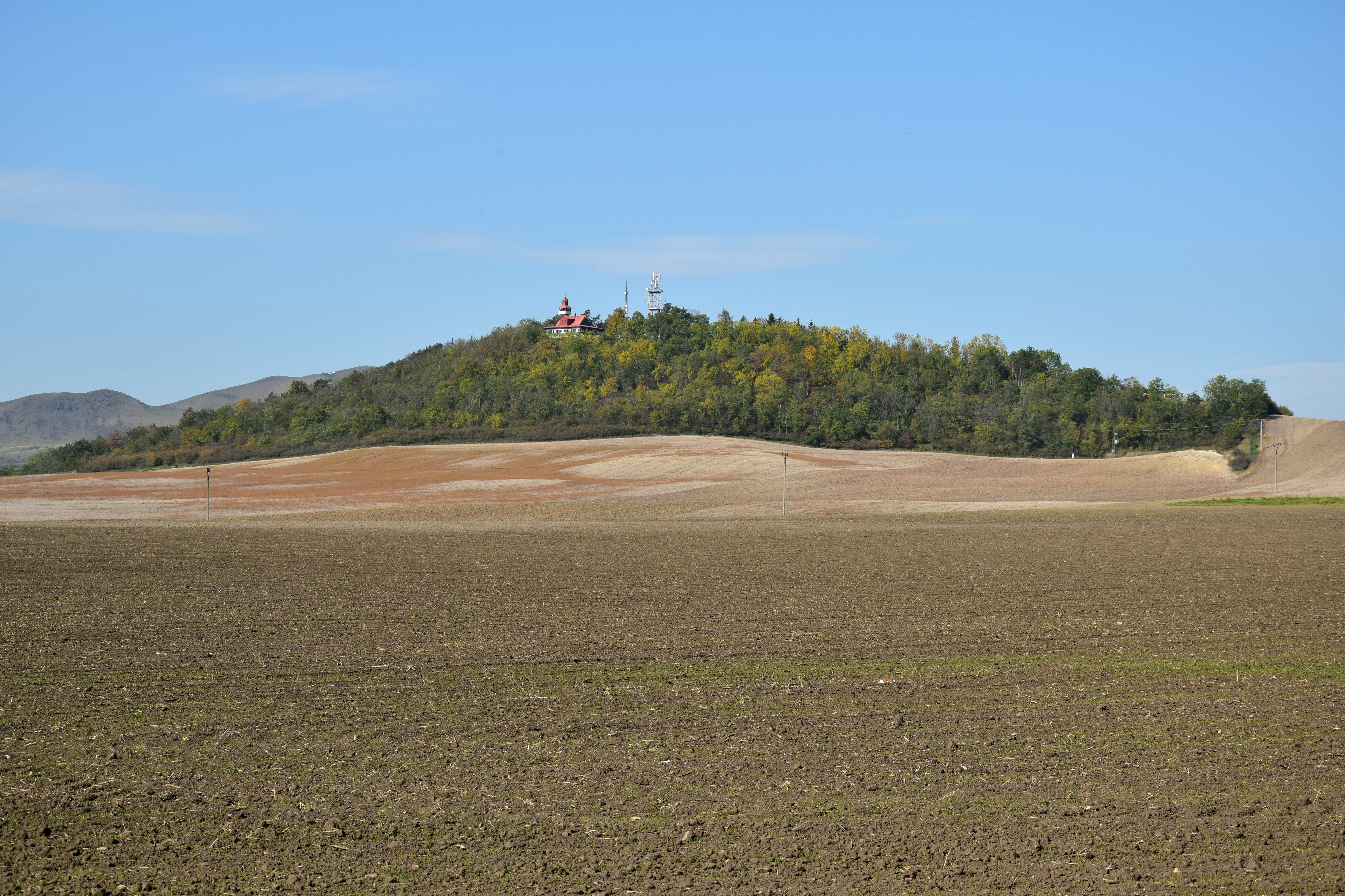 Vrch Stříbrník – pohled ze silnice Dobroměřice–Nečichy